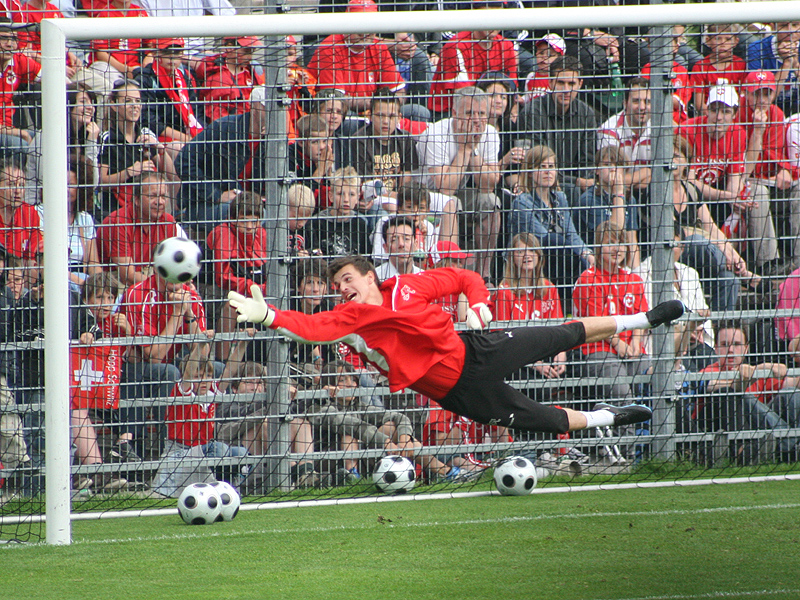 Eldin Jakupovic im Trainingslager der Schweizer Fussballnationalmannschaft vor der Euro 2008